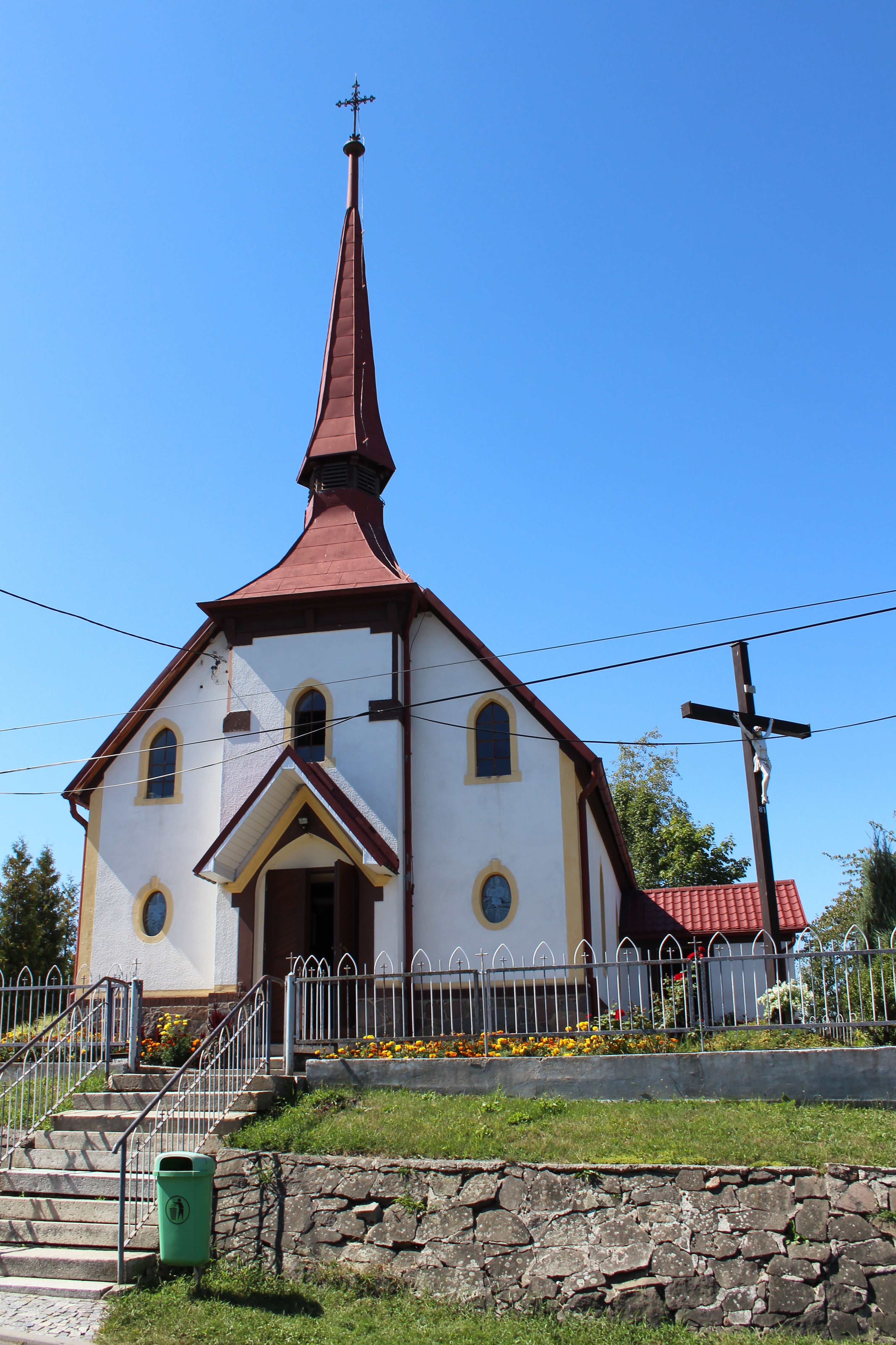 Goszczowice - rzymskokatolicki kościół filialny p.w. Matki Bożej Różańcowej, 1903